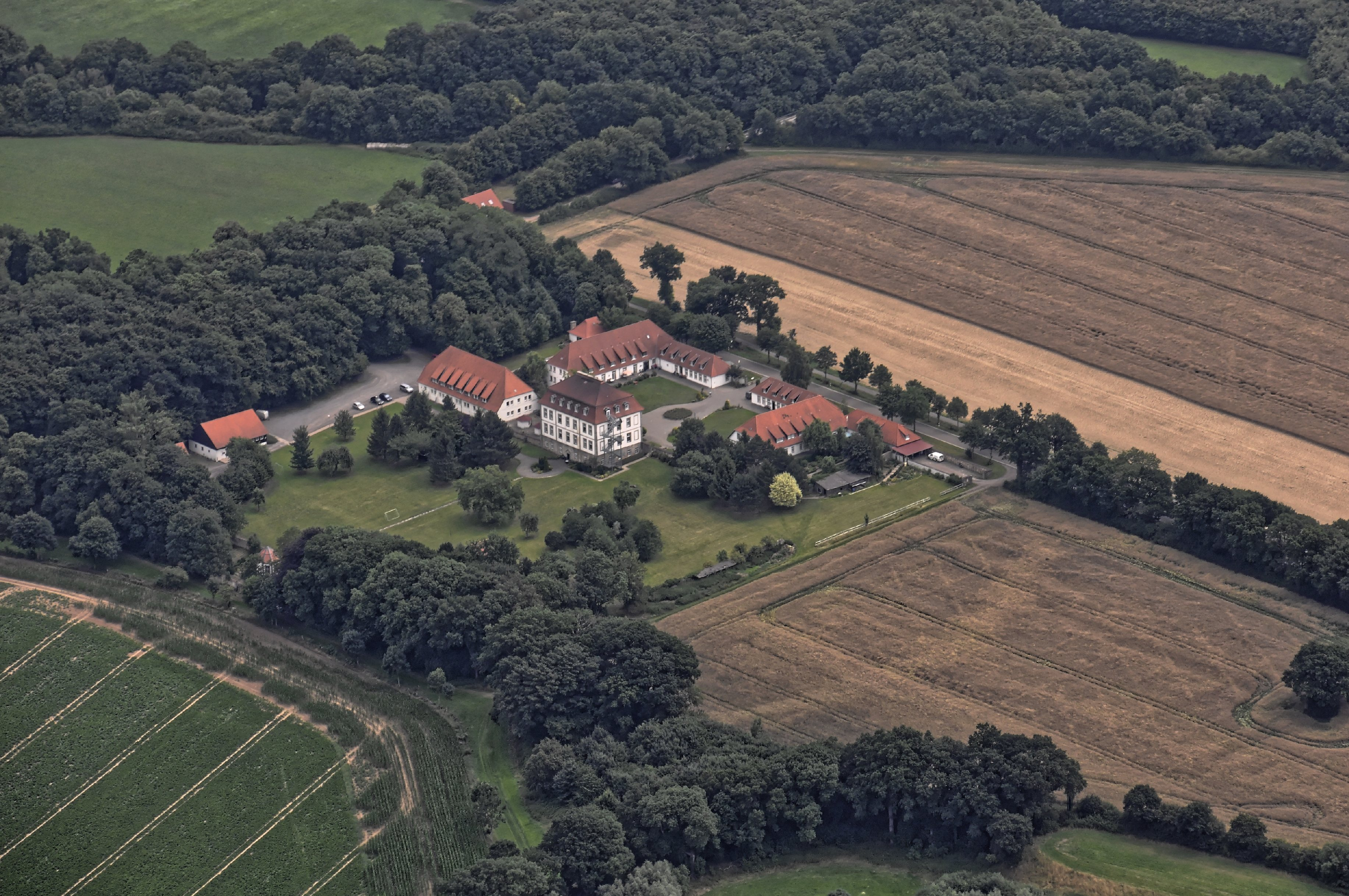 Bilder vom Flug Nordholz-Hammelburg 2015: Gut Neuhof